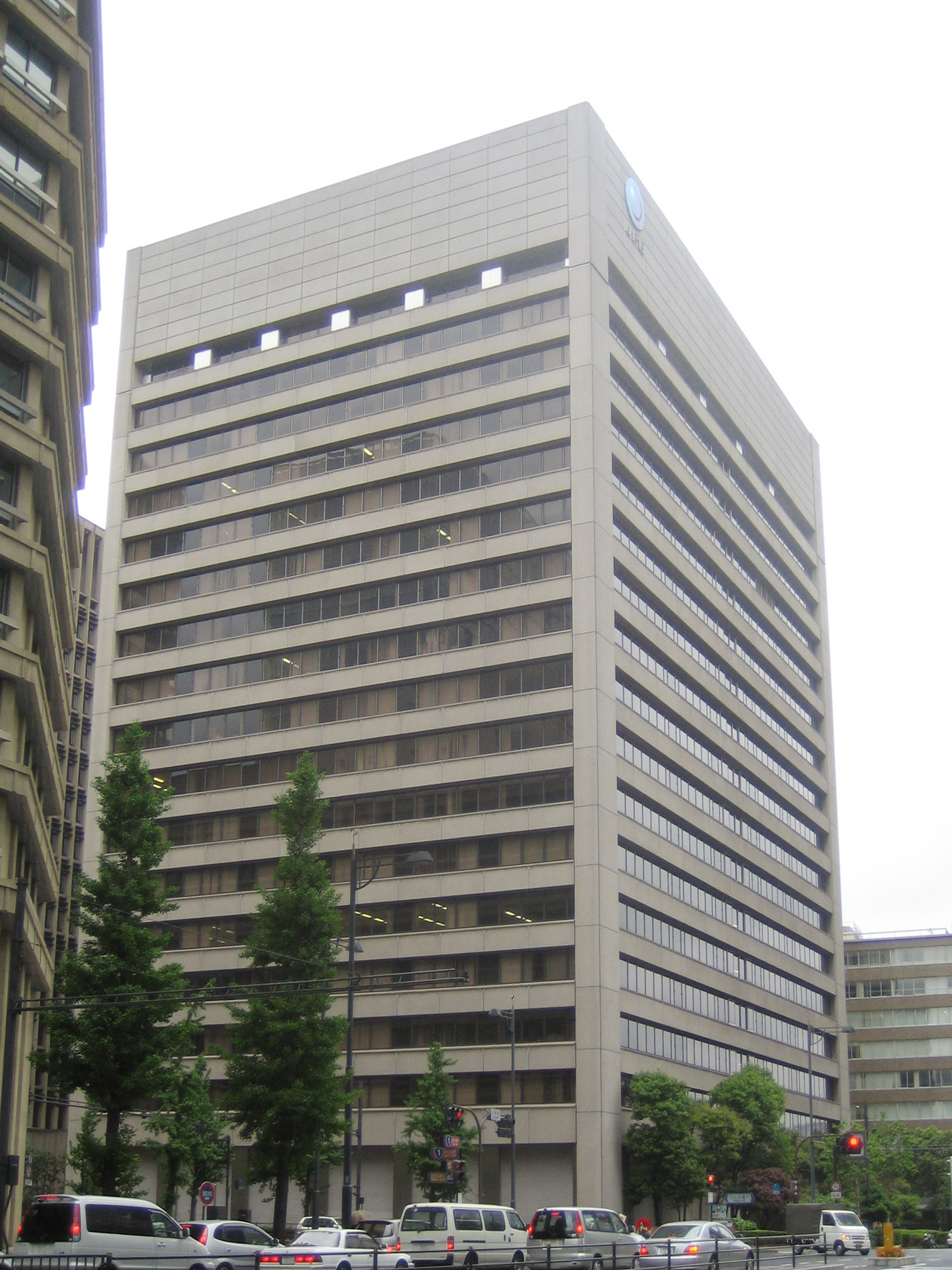 JFE Holdings (JFEホールディングス), in Chiyoda, Tokyo, Japan